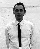 Portrait von Bernd Erich Gall